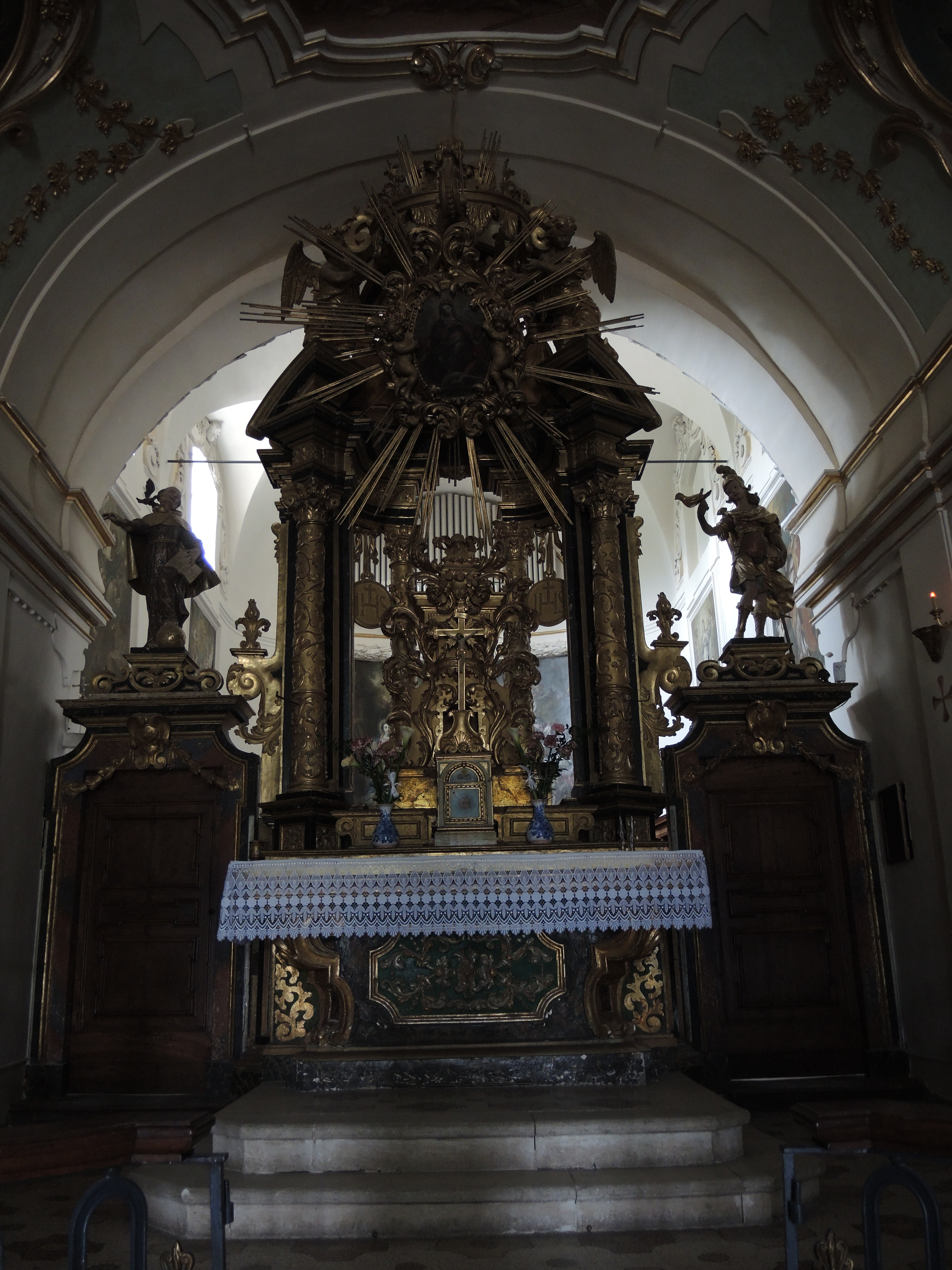 L'Aquila: Convento di San Giuliano